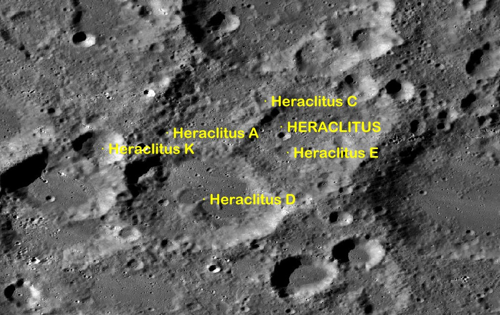 Cráter lunar Heraclitus. Cráteres satélite. (Imagen LROC)